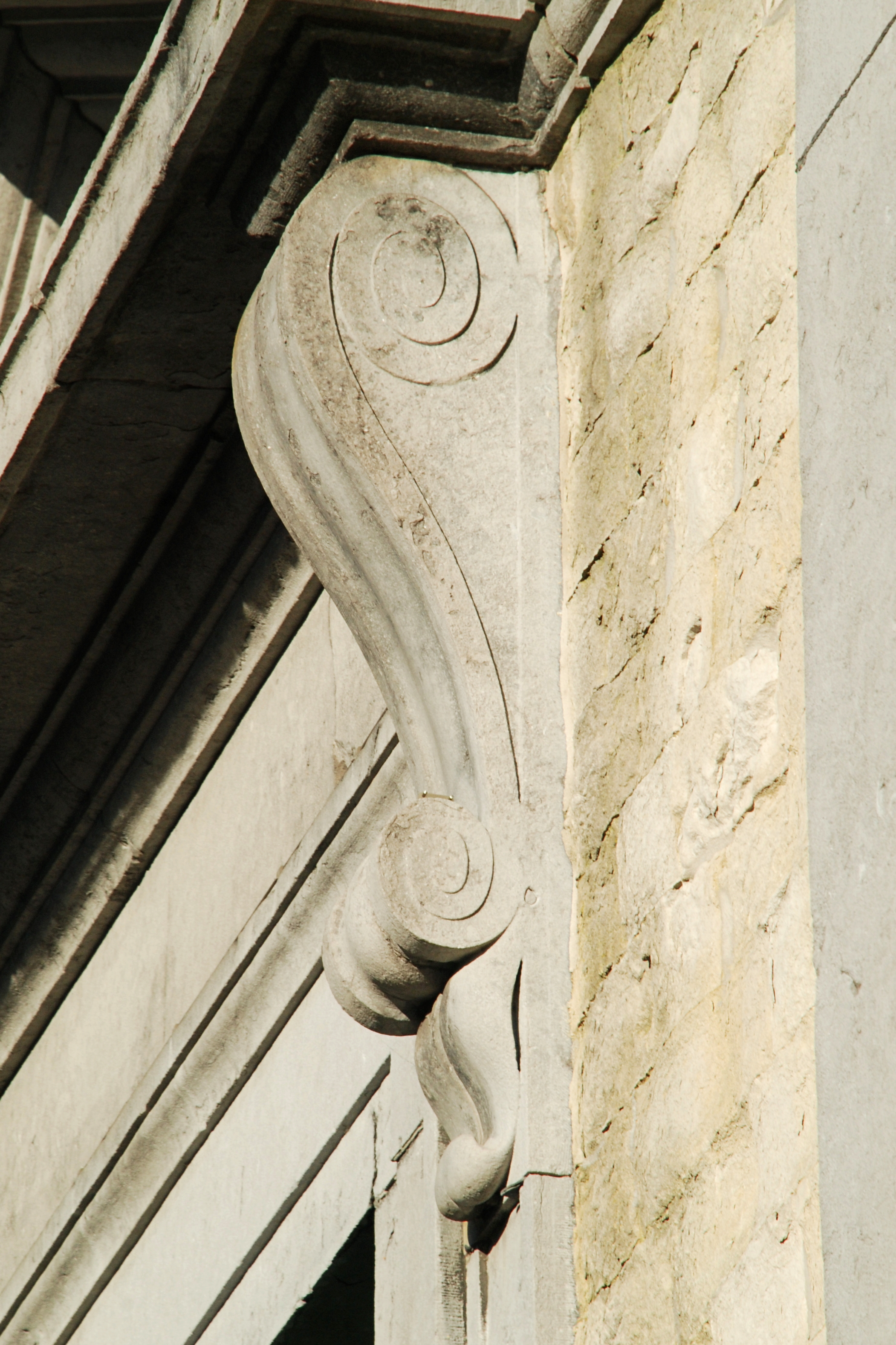 Belgique - Brabant wallon - Église Saint-Jean l'Évangéliste de Genappe